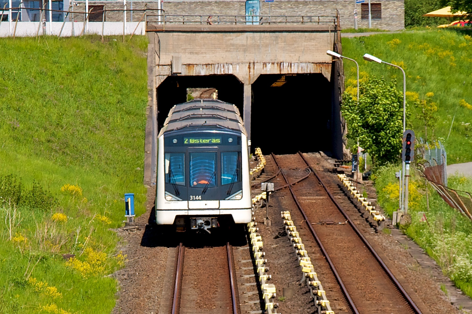 MX3000-tog nær Tveita.